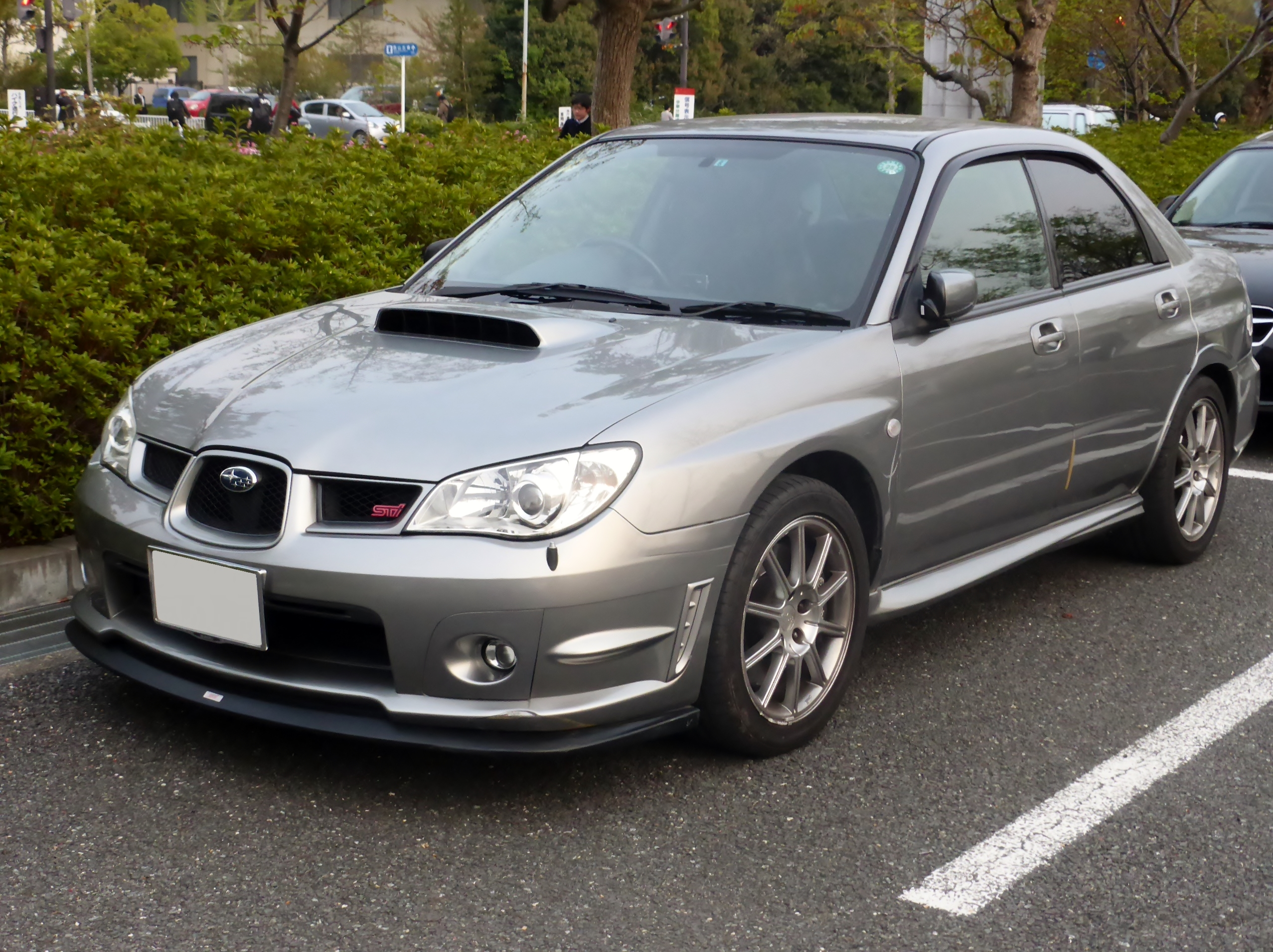 GDD型スバル・インプレッサWRX STI AｰLineをフロントから撮影。